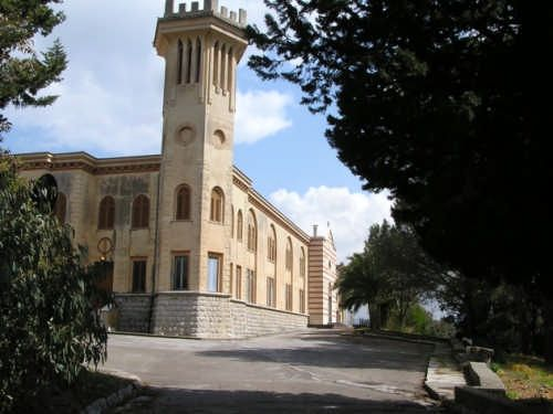 Monastero basiliano SS. Salvatore (Sclizza-Sklica), osservante dai monaci italo-albanesi il rito bizantino, a Piana degli Albanesi (PA), Sicilia, Italia.